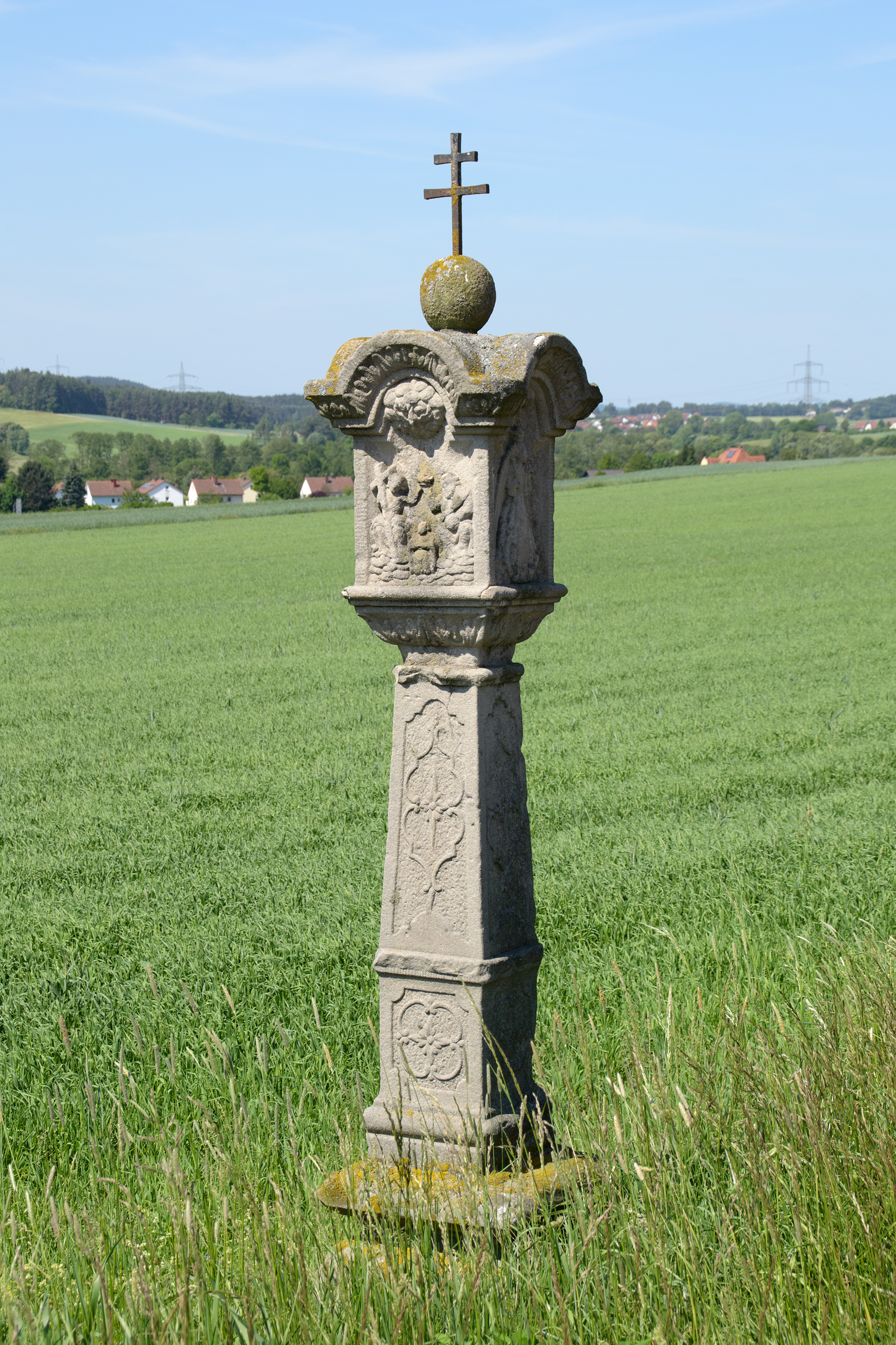 Marter an der Straße nach Glosberg im Kronacher Ortsteil Gundelsdorf